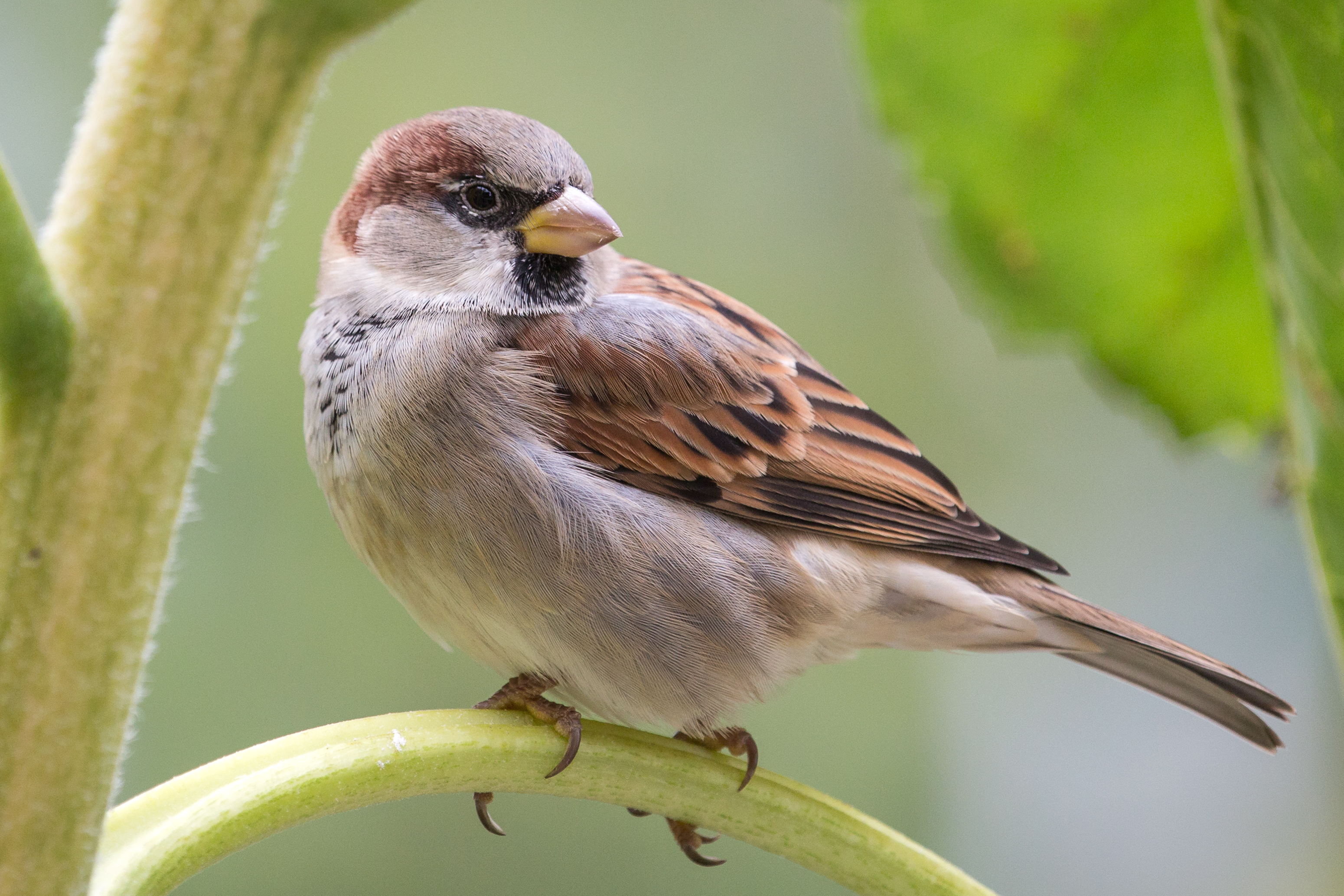 Домовый воробей (самец)